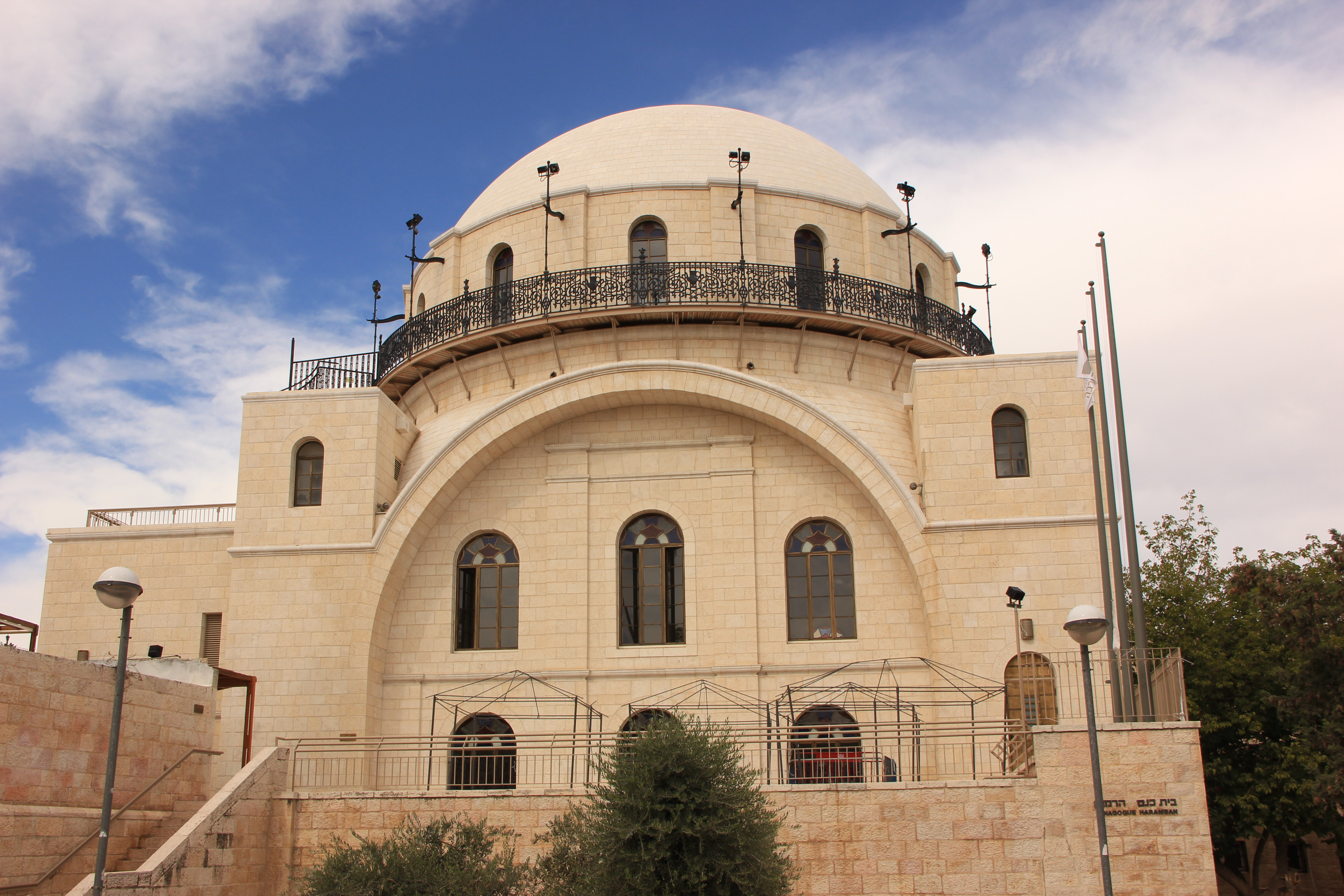 בית הכנסת החורבה או חורבת רבי יהודה החסיד הוא בית כנסת במרכז הרובע היהודי בעיר העתיקה. הוא נבנה לראשונה ב-1700 על ידי חבורת רבי יהודה החסיד ונחרב פעמיים עד שנבנה בשלישית ב-2010.